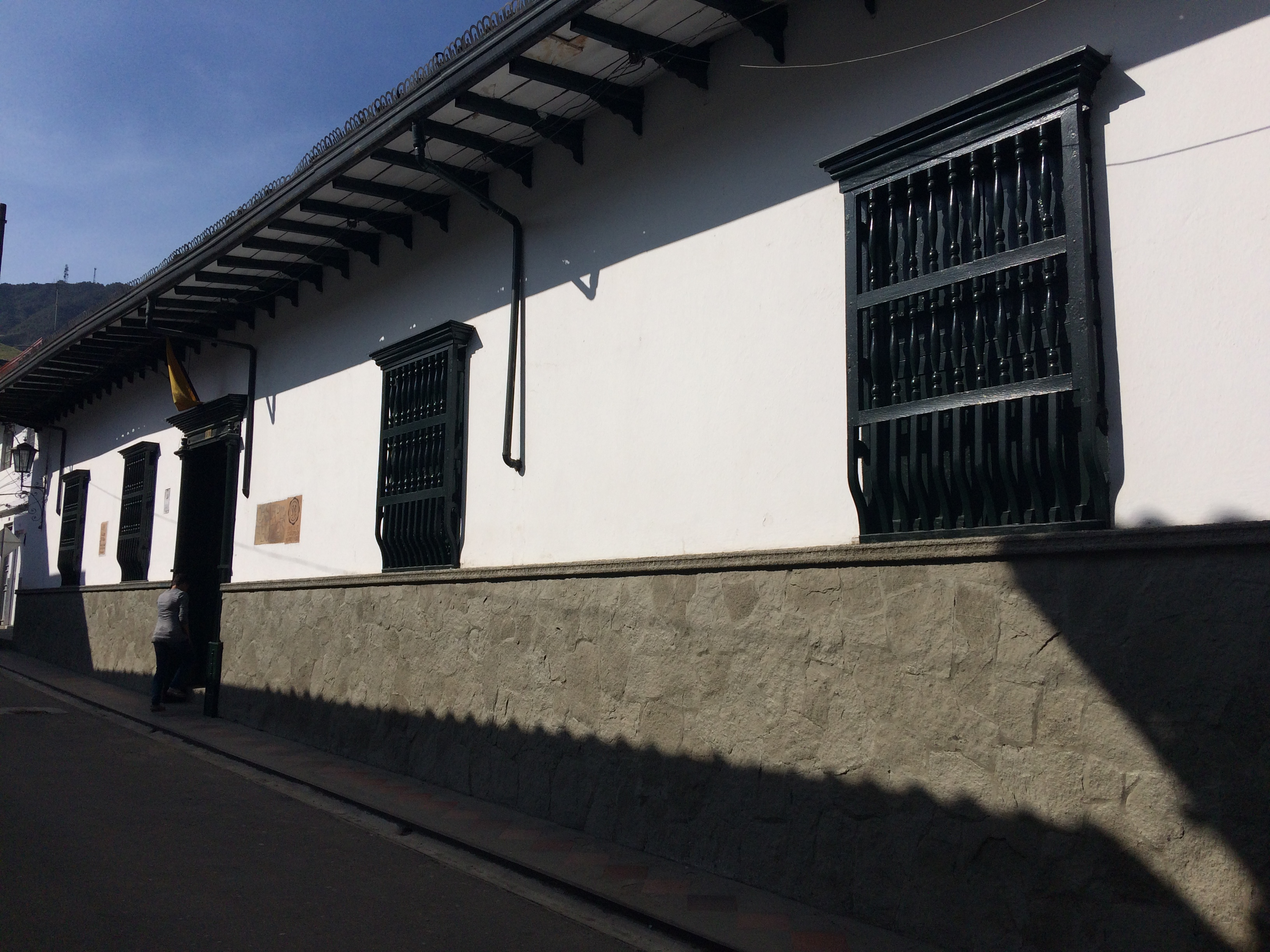 Sede del Museo Casa de los Abuelos en Sonsón.